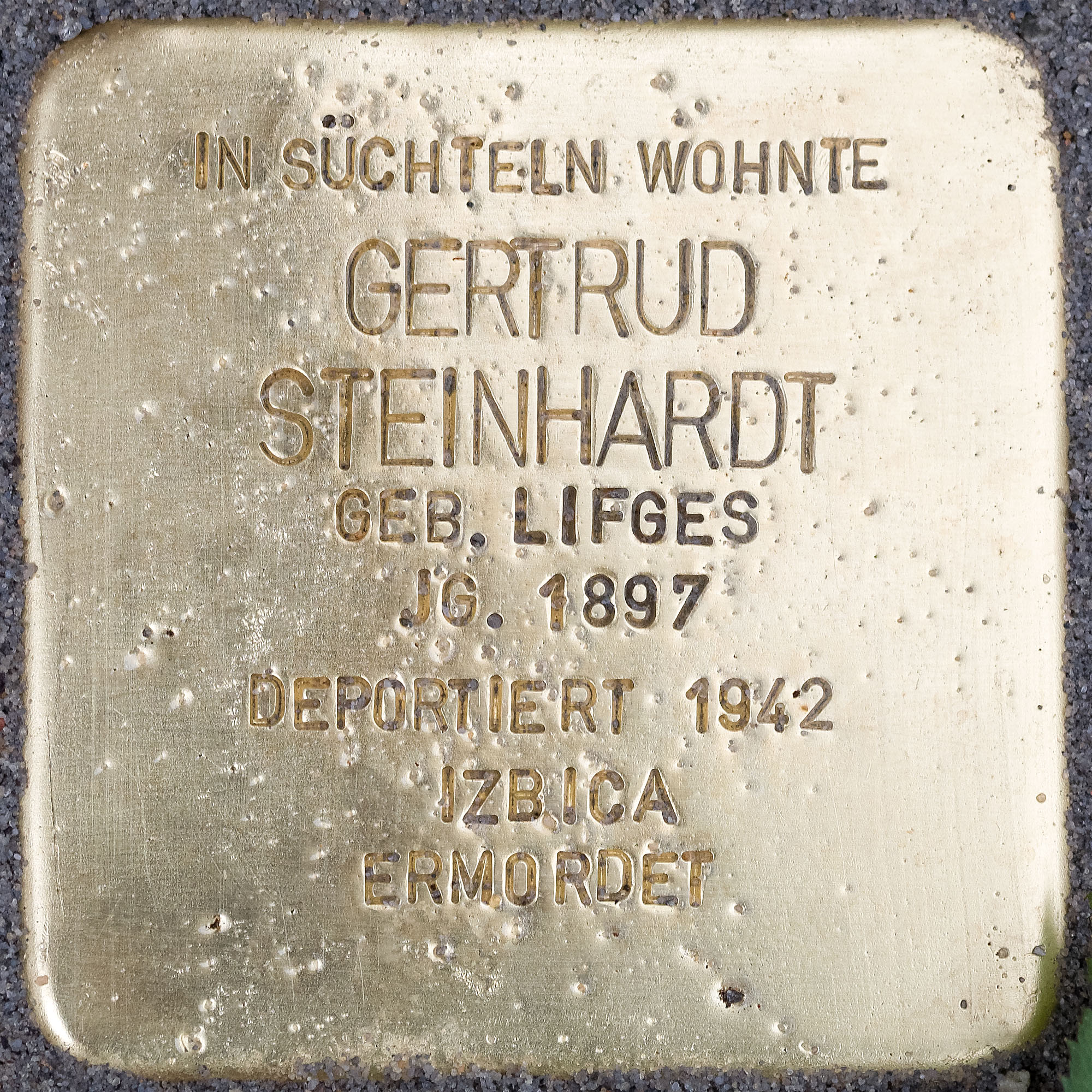 Stolpersteine Suechteln: Steinhardt, Gertrud